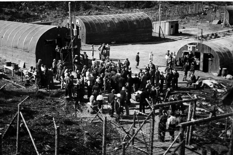 Krigsfangeleir på Sætreskauen i Hurum 1945